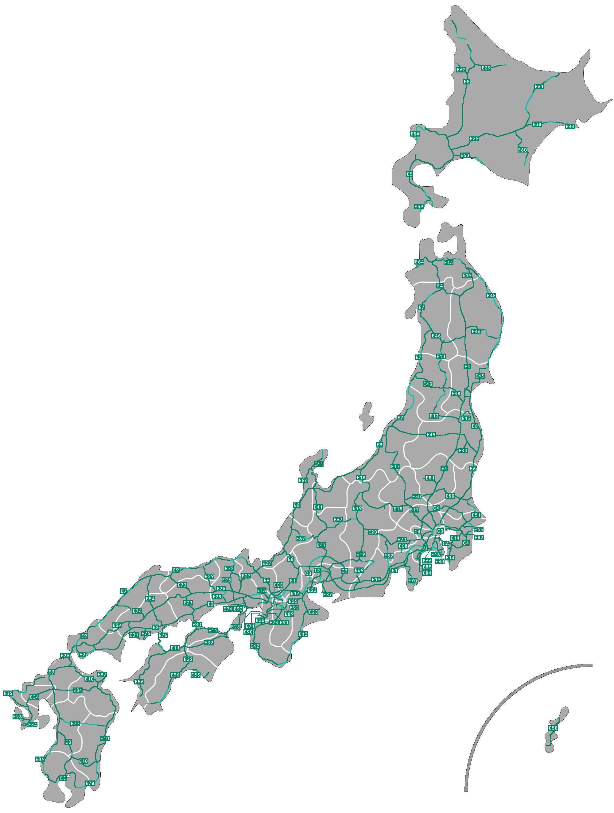 نقشه شبکه آزادراههای ملی ژاپن